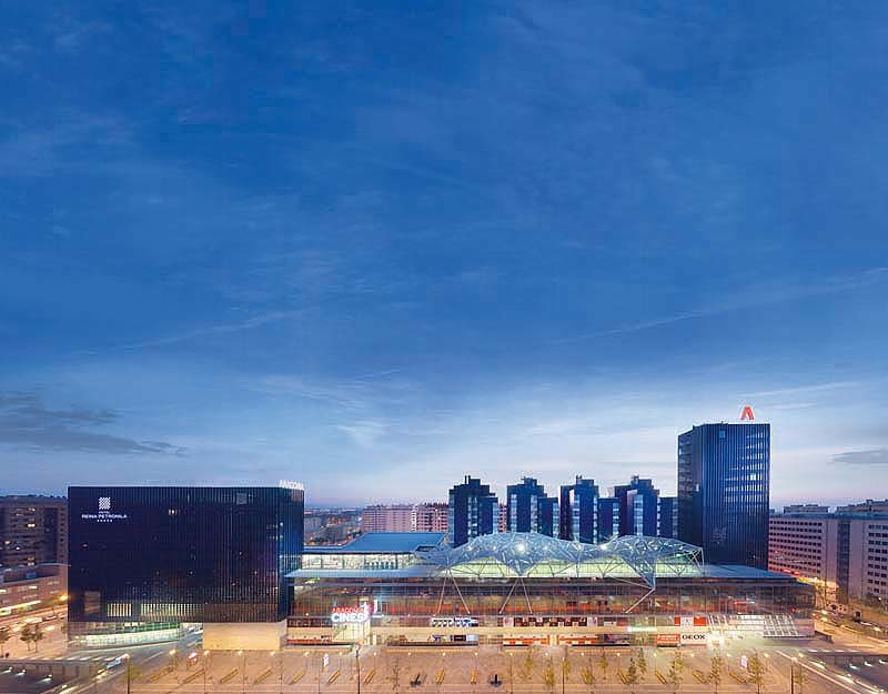 Plano exterior Aragonia